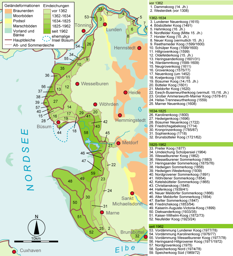 Geschichte des Deichbaus in Dithmarschen. Die Perioden sind wie folgt eingeteilt: Vor 1362 Köge, die bereits vor der 2. Marcellusflut (große Manndränke) am 16.1.1362 bestanden. 1362-1634 Die Burchardiflut (zweite große Manndränke) am 11.10.1634 hinterließ in Dithmarschen zwar weniger Schäden als in Nordfriesland, Anfang des 17. Jahrhunderts änderte sich jedoch auch der Deichbau. Er wurde nicht mehr durch die Anwohner ausgeführt, sondern war durch Sonderrechte und Steuerprivilegien frei finanziert. Die Verbreitung der Schubkarre und der Import holländischer Deichbautechniken brachte eine weitere Verbesserung. 1634-1825 Die sogenannte Halligflut am 3. und 4.2.1825 fiel wiederum mit einer Periode von Erneuerungen zusammen. Anlass war der Erlass eines einheitlichen Rechts zum Deichbau durch den dänischen König Christian VII. im Jahr 1800. 1825-1962 Nach der Hamburgsturmflut am 16. und 17.2.1962 wurde der Generalplan Küstenschutz erlassen. In der Zeit von 1825 bis 1962 wurde mit dem Ziel der Gewinnoptimierung eine große Zahl von Sommerkögen eingedeicht. seit 1962 Seit dem Erlass des Generalplans Küstenschutz werden vorwiegend bestehende Deiche verstärkt und Köge zur Deichlinienverkürzung angelegt. An Stelle der Gewinnoptimierung ist der Naturschutz ein wichtiges Ziel geworden.